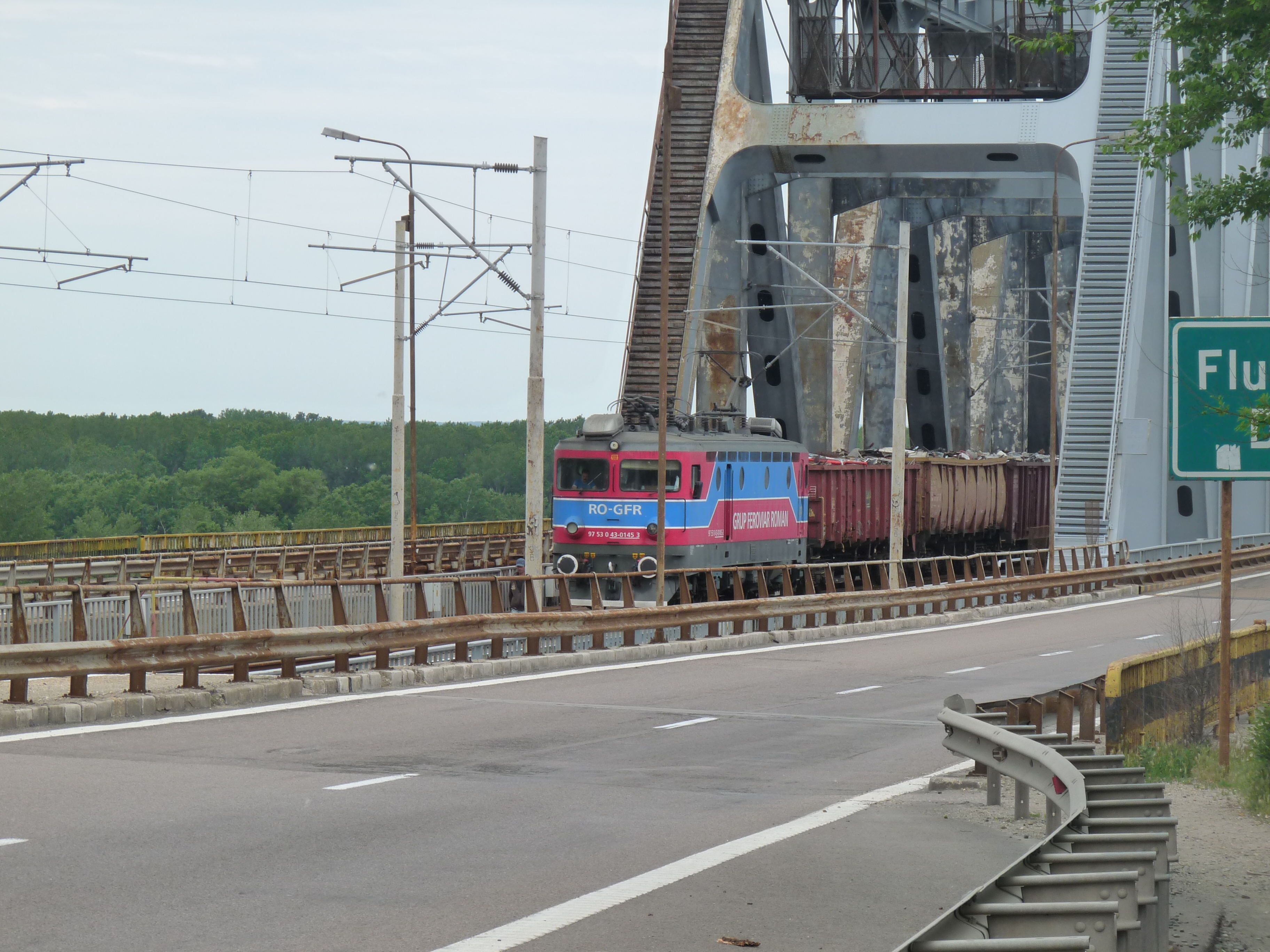 De spoorbrug Cernavodă gefotografeerd vanaf de oever bij Cernavodă